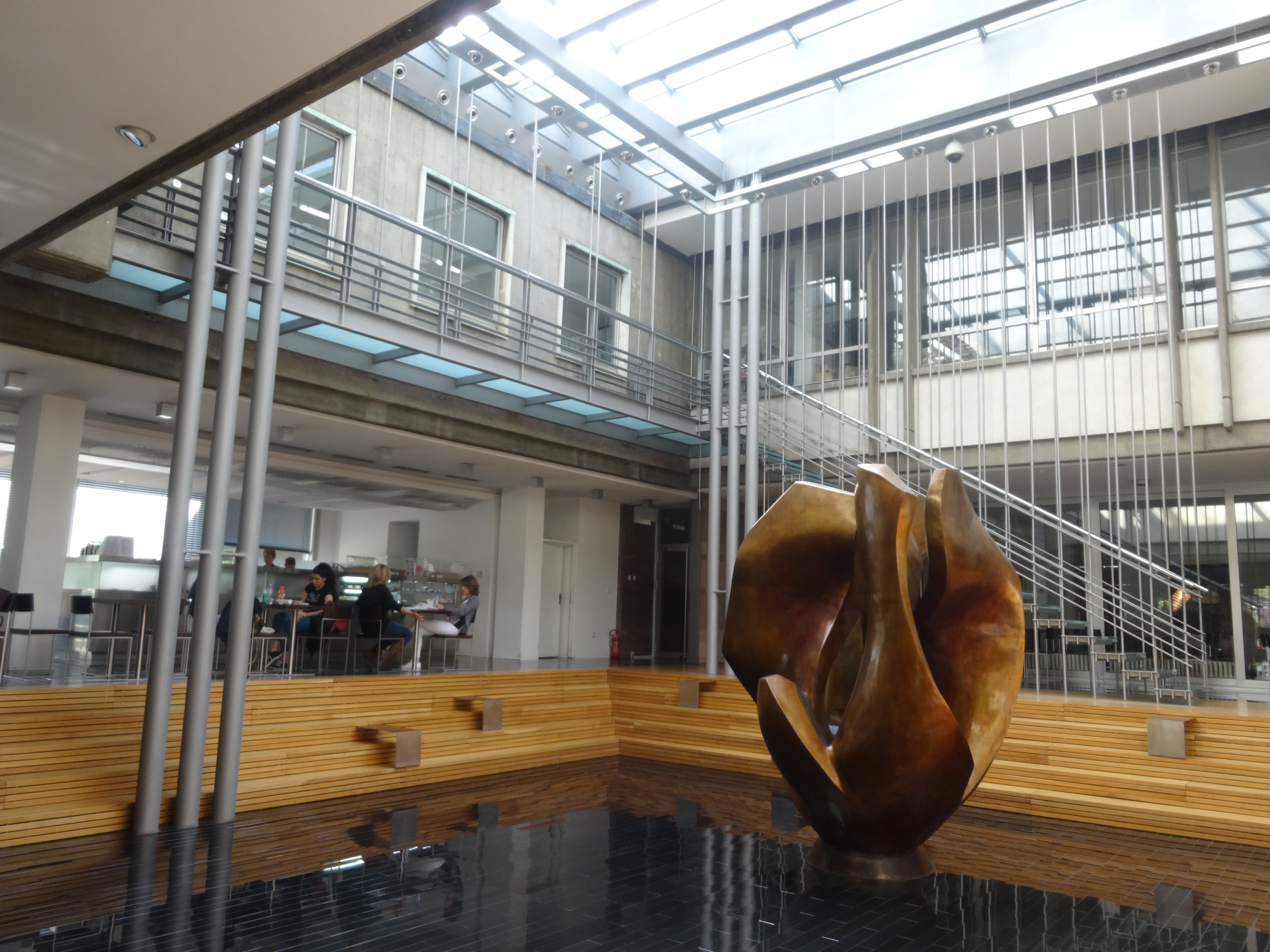 This media file is allowed by the National Library of Serbia.